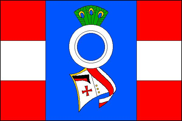 Vlajka obce Šelešovice